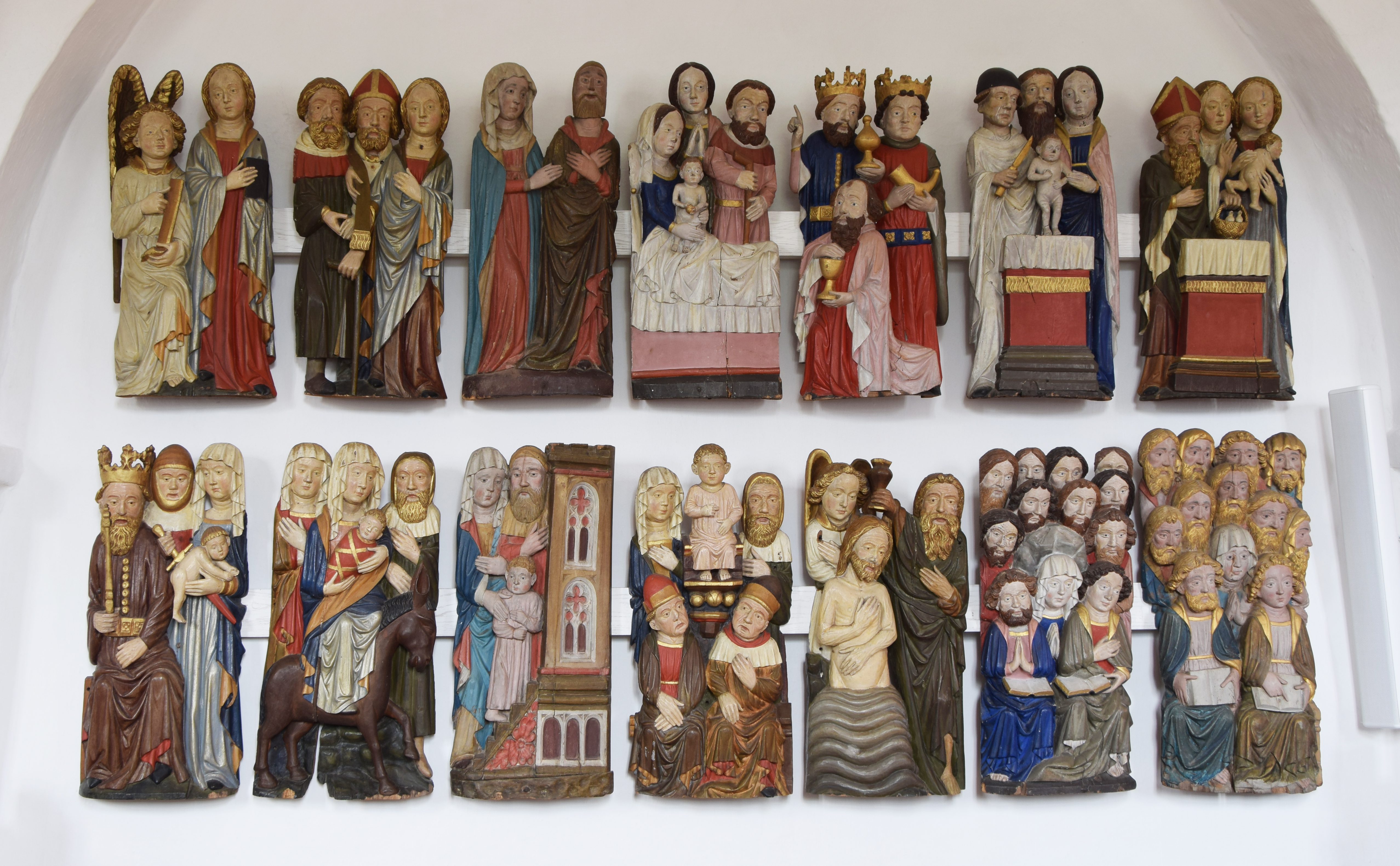 Aal Kirche Hans Snitger d.Ä Holzreliefs